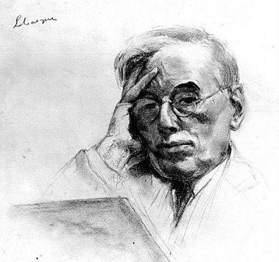 Self-portrait